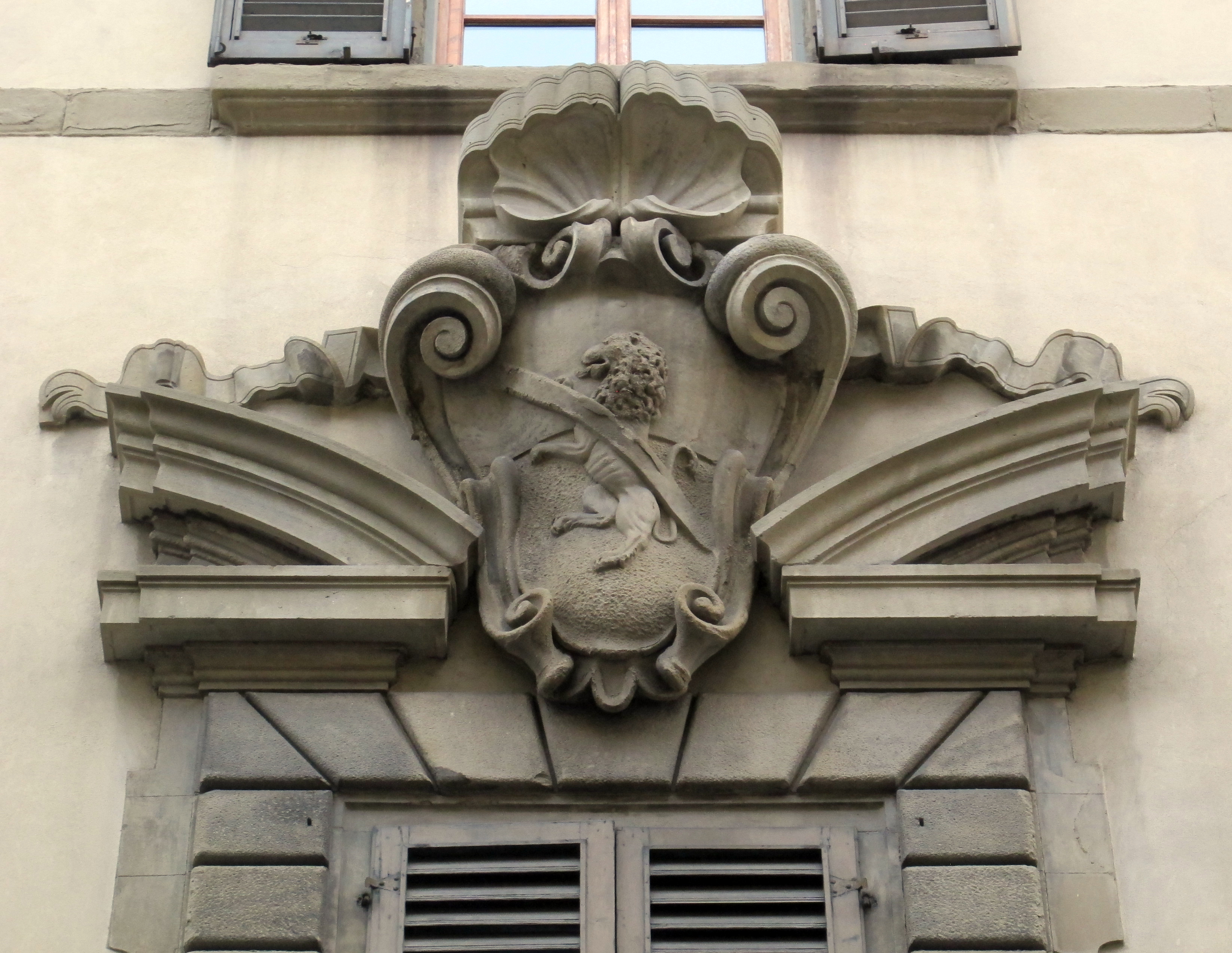 Via ghibellina, Palazzo Guicciardini Corsi Salviati